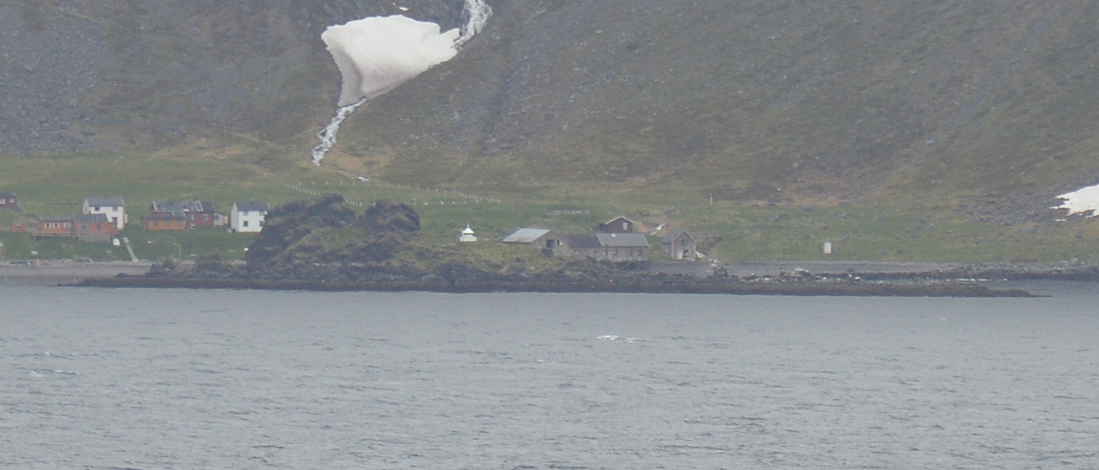 Insel Kjelen vor Kjelvik